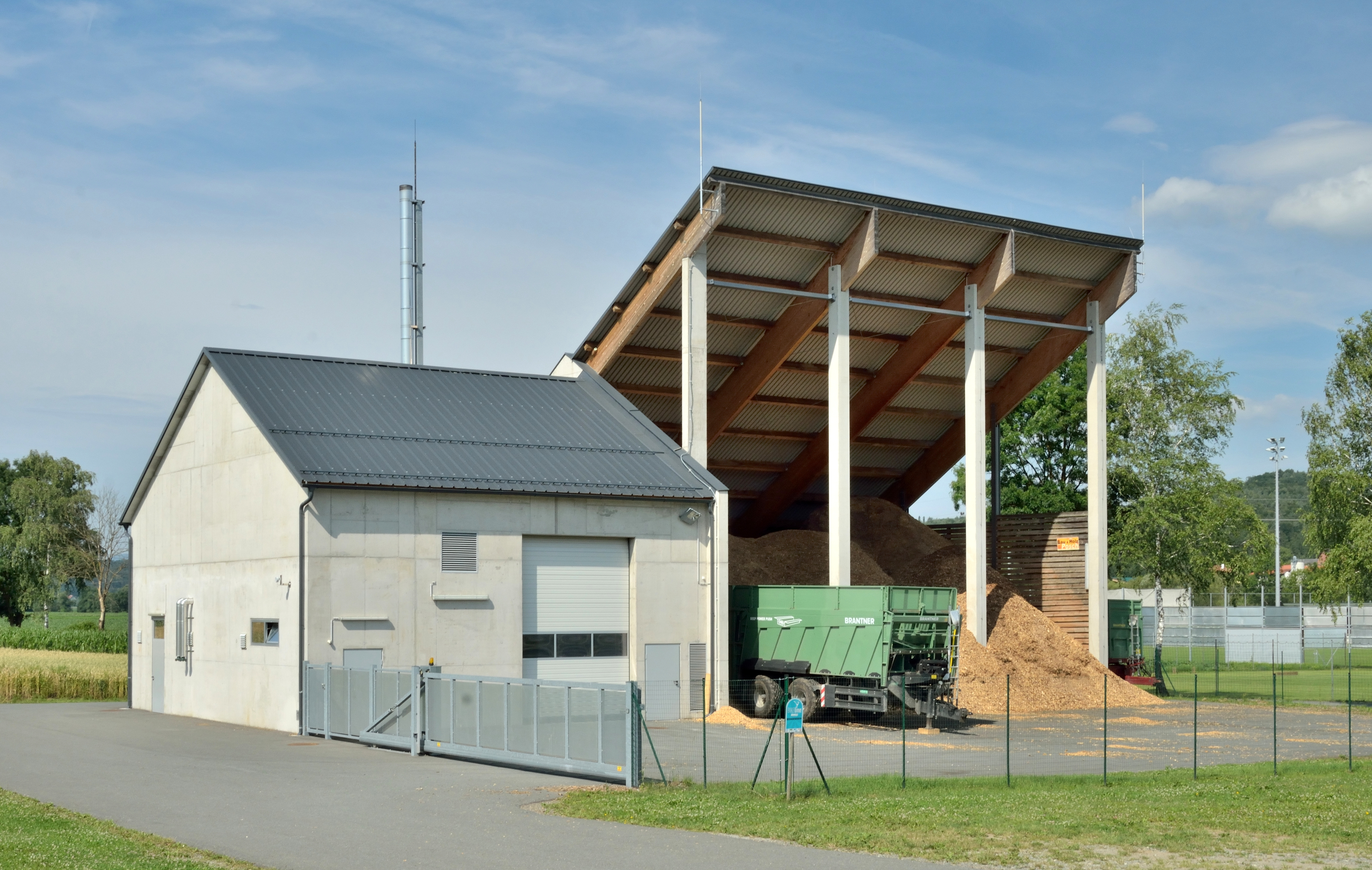 Biomasseheizwerk Großklein, Steiermark